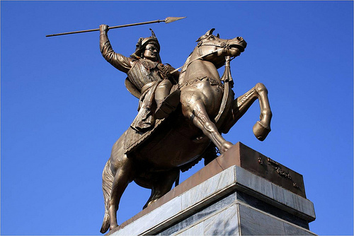 थोरले बाजीराव